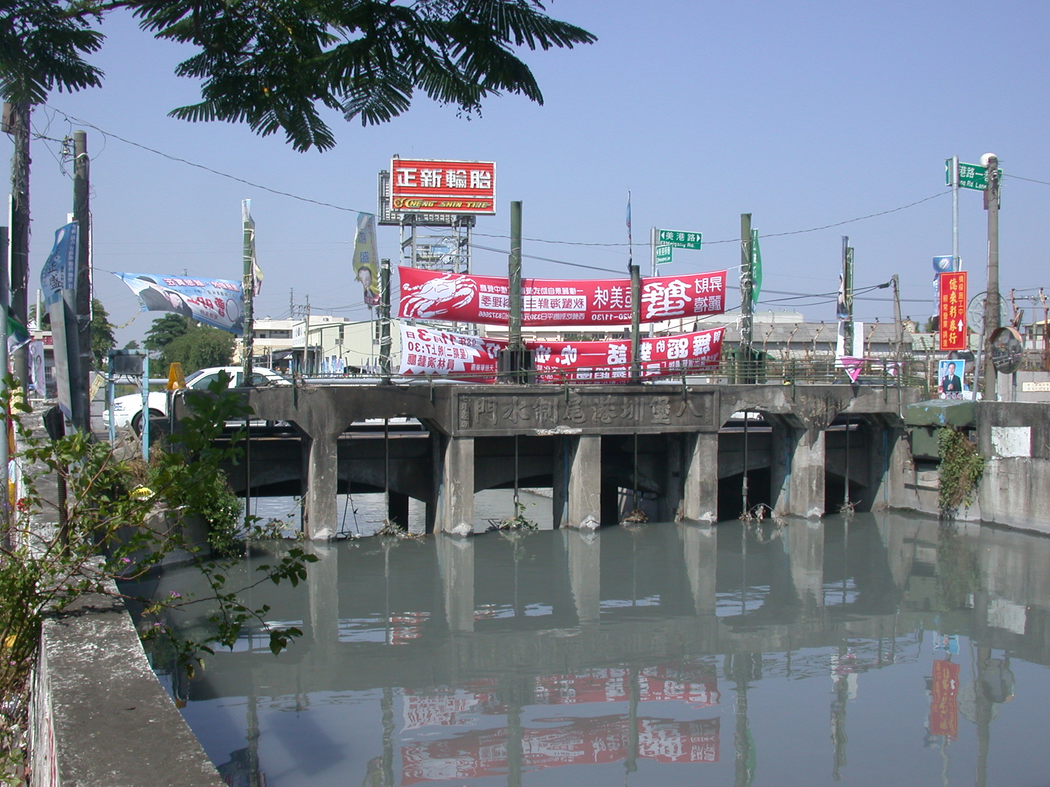 Bân-lâm-gú: 佇彰化縣大村鄉美港村的八堡圳港尾制水門，大正十三年(1924年)七月竣工，民國一百年(2011年)後壁部份拆掉重起新的。這除了是制水門，嘛是美港一號橋。